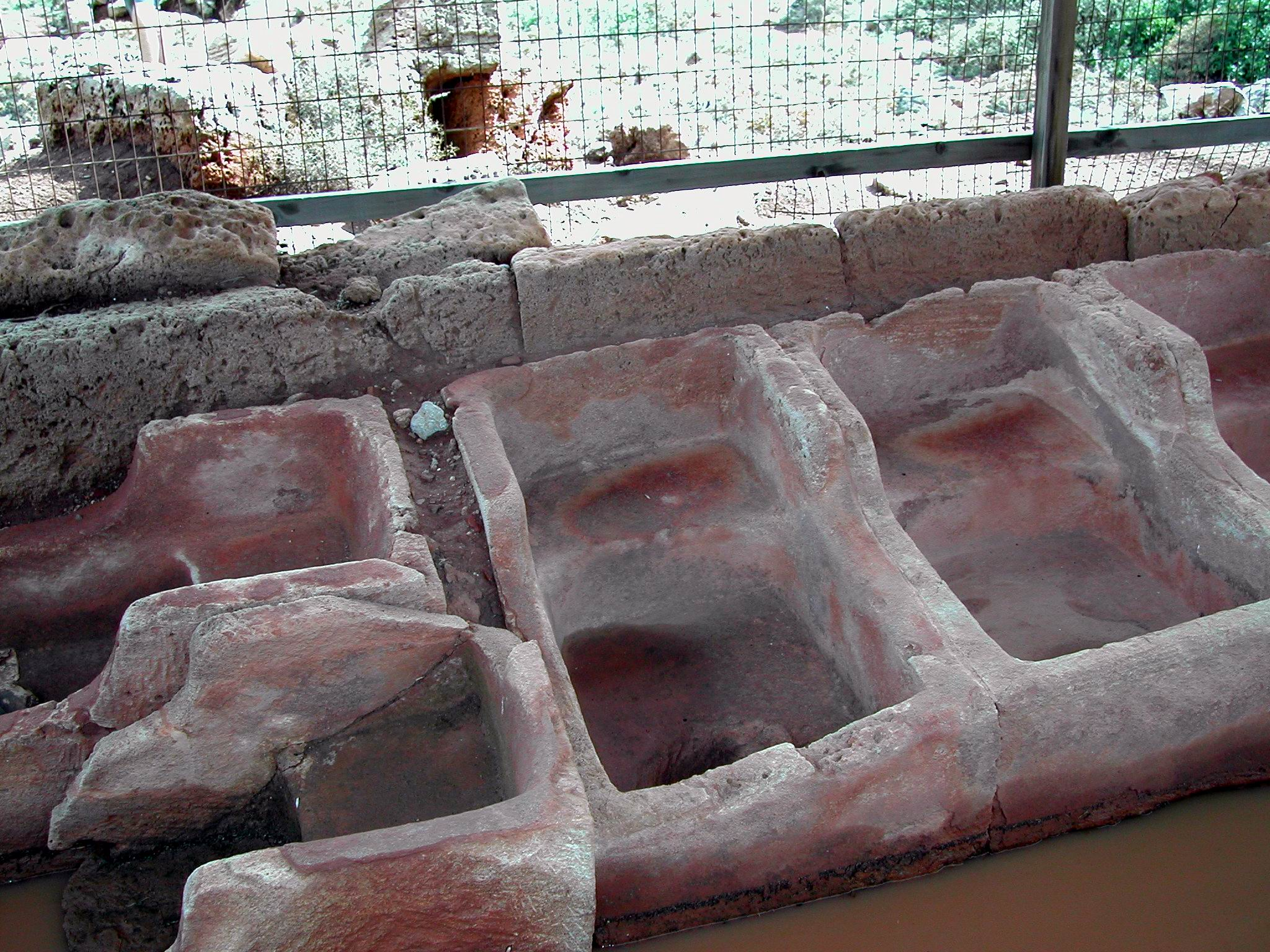 View on Ancient Falasarna (detail) Crete